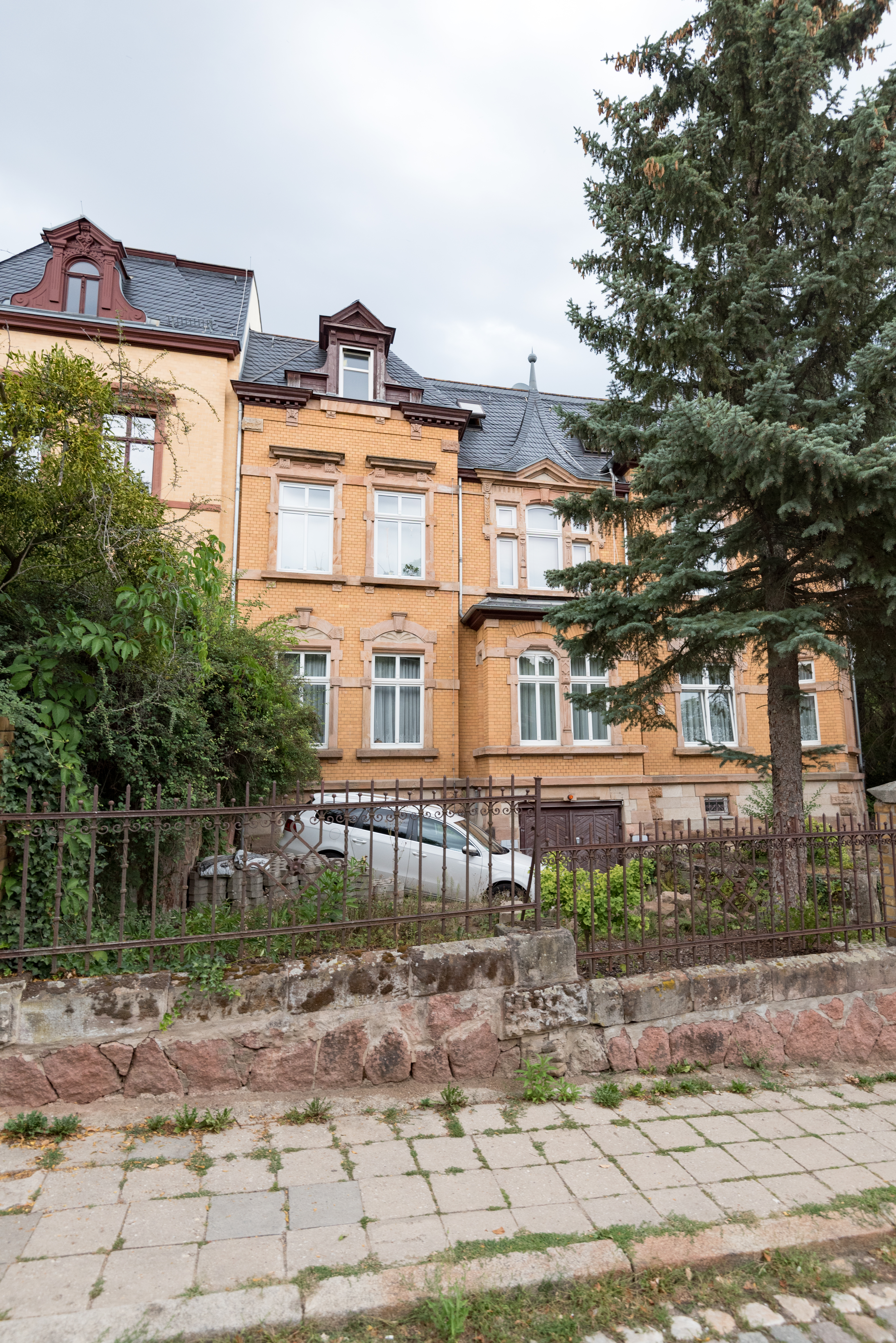 Naumburg (Saale), Luisenstraße 16